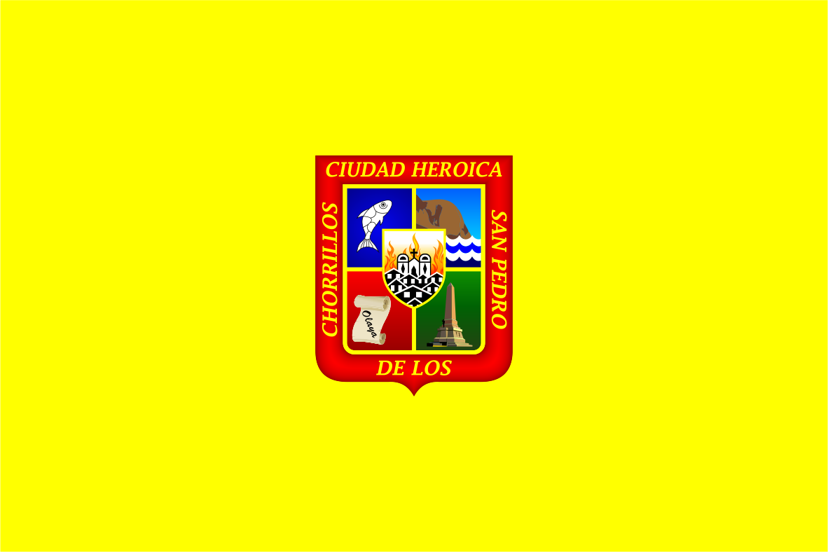 Distrito de Chorrillos - Provincia de Lima - Región Lima